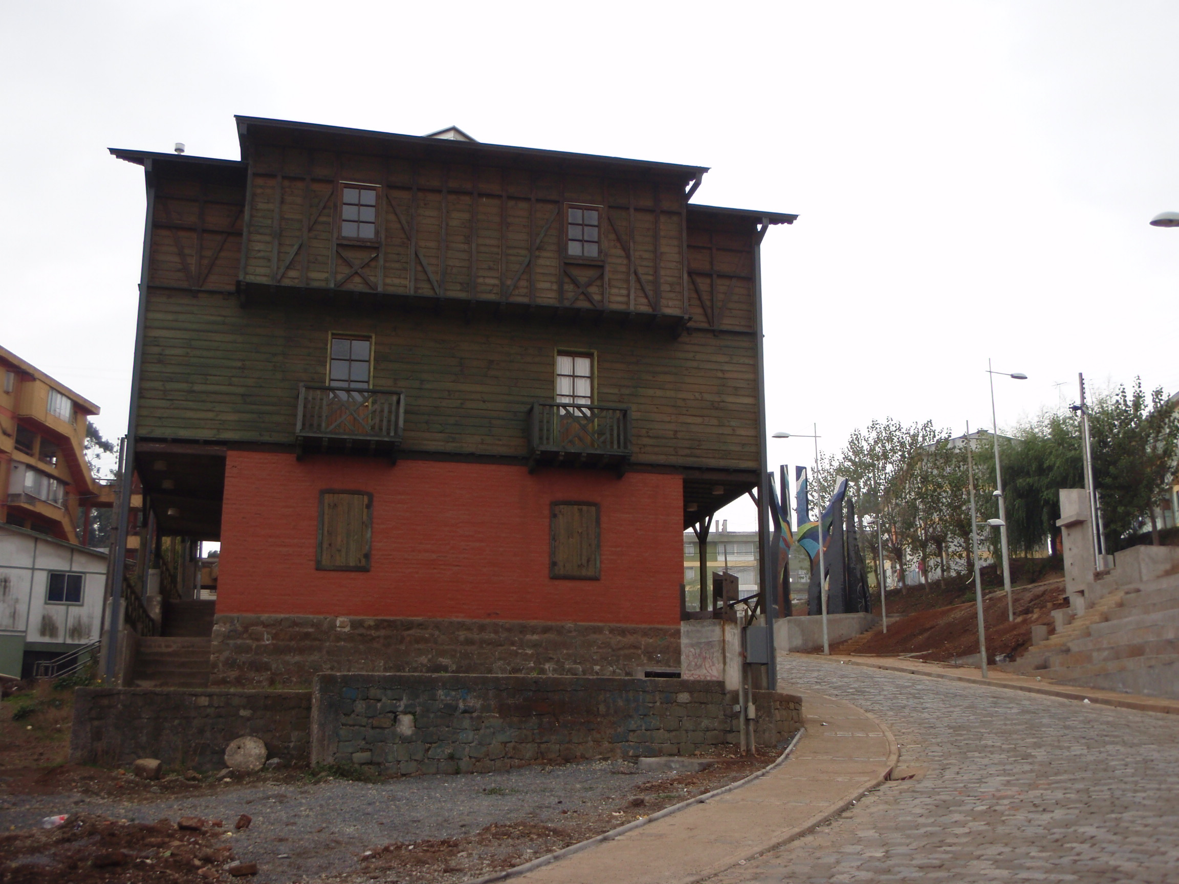 Centro Cultural Pabellón 83, Lota. This is a photo of a national monument in Chile: 2135